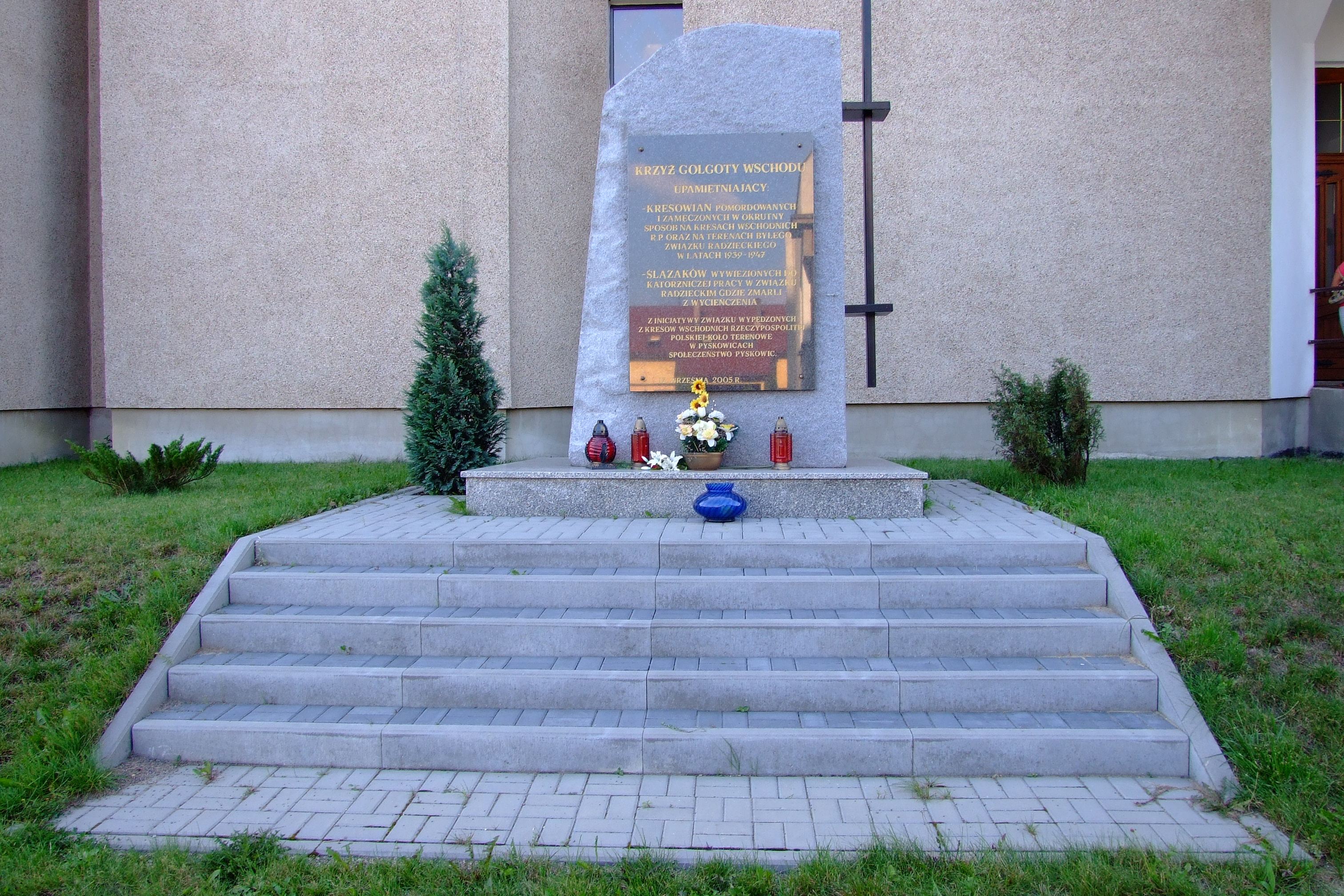 Krzyż Golgoty Wschodu obok kościoła Nawrócenia św. Pawła Apostoła w Pyskowicach